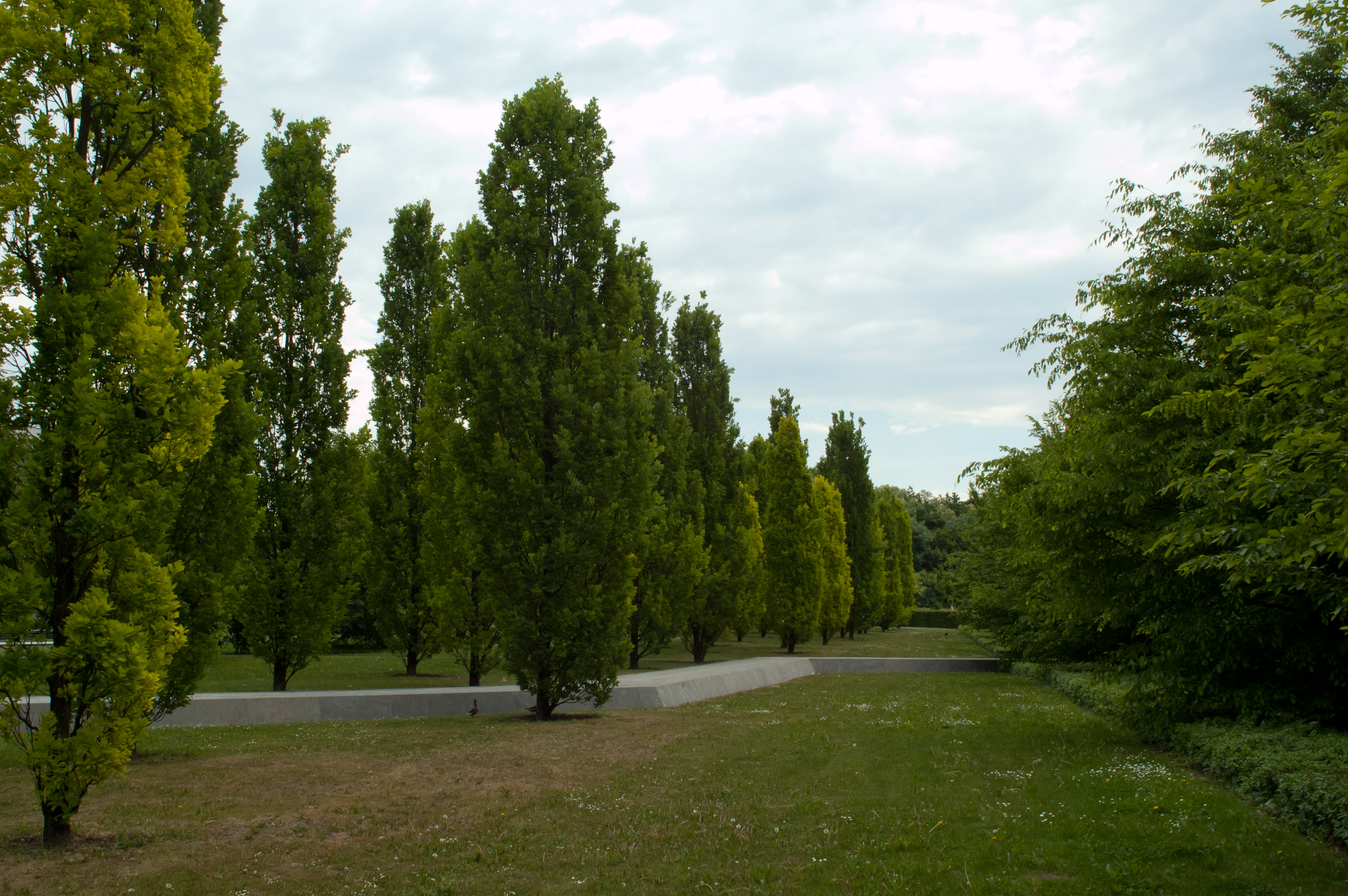 Park am Bundesarbeitsgericht in Erfurt mit zahlreichen Exemplaren der Säuleneiche (Quercus robur 'Fastigiata')